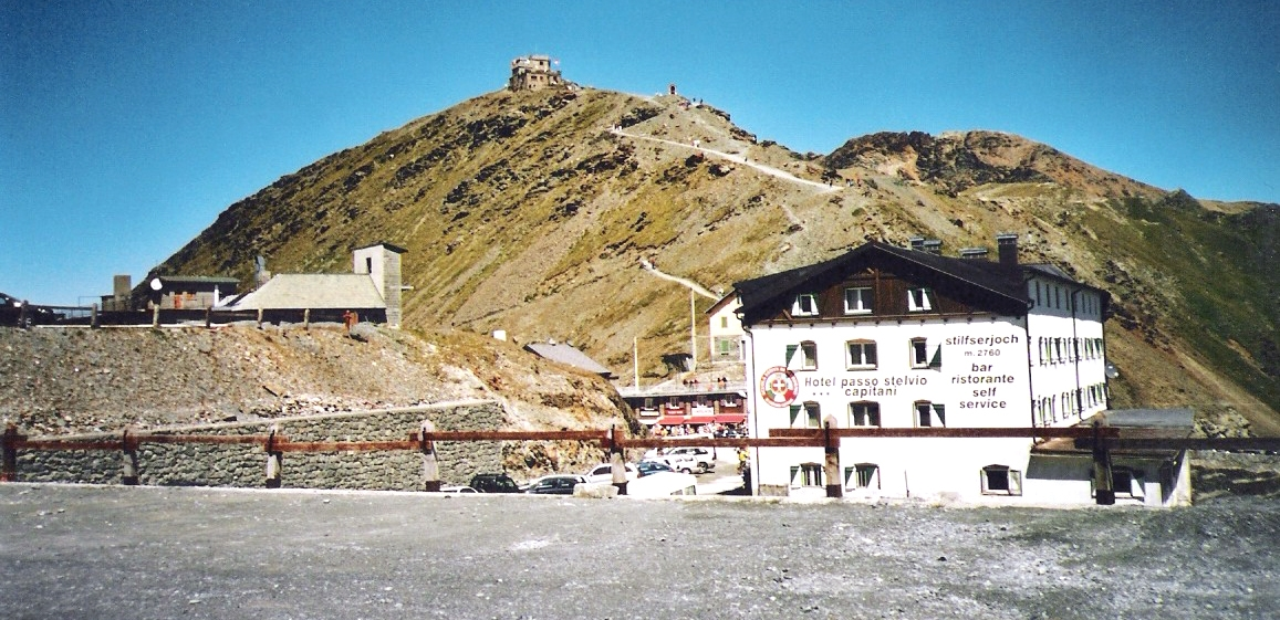 Dräisproochespëtz